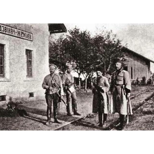 На фото командир Ингушского конного полка с 1917 года Костоев Асланбек Бейтиевич (крайний справа) на станции "Дзвиняч-Жежава.